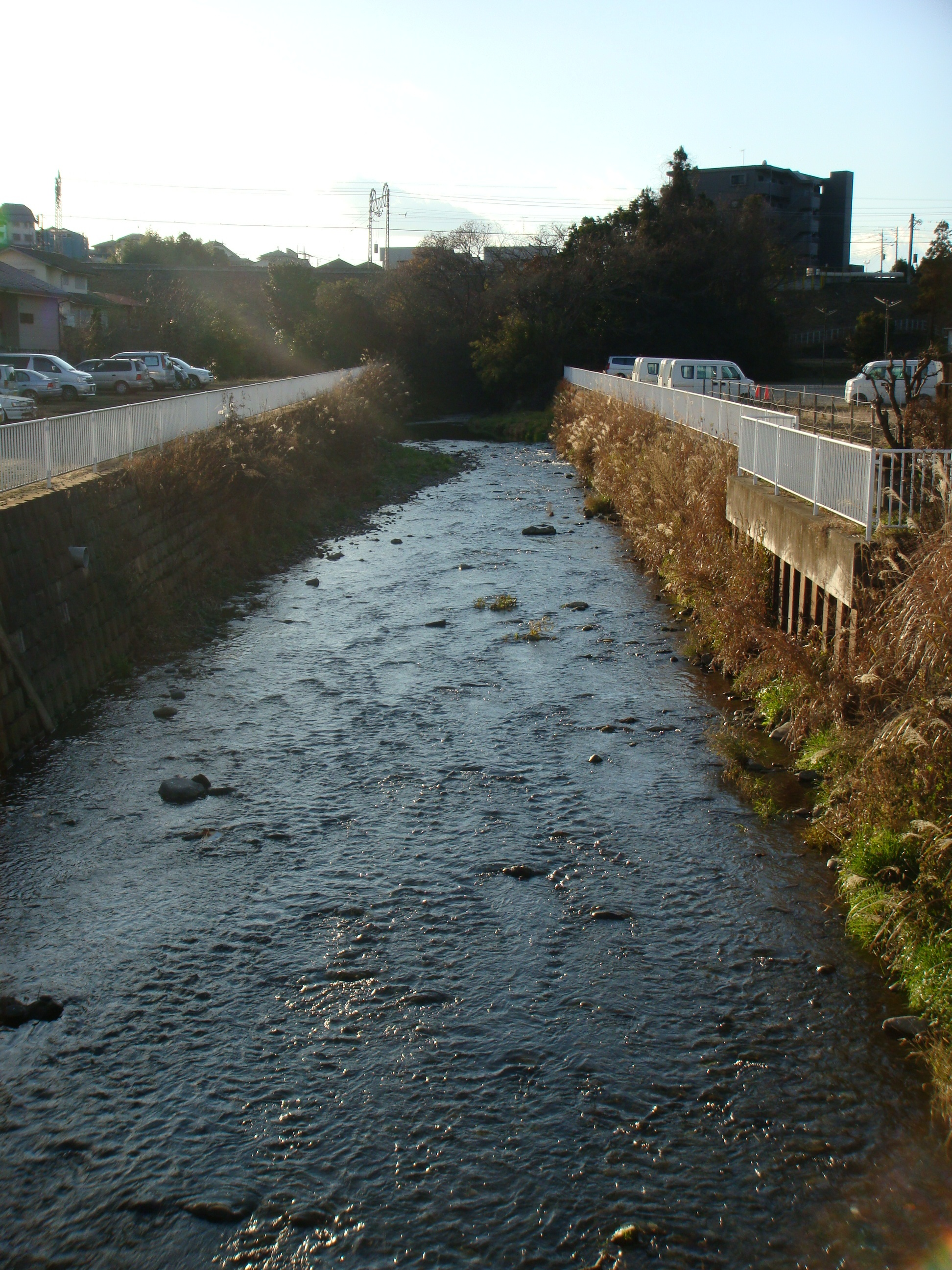 室川